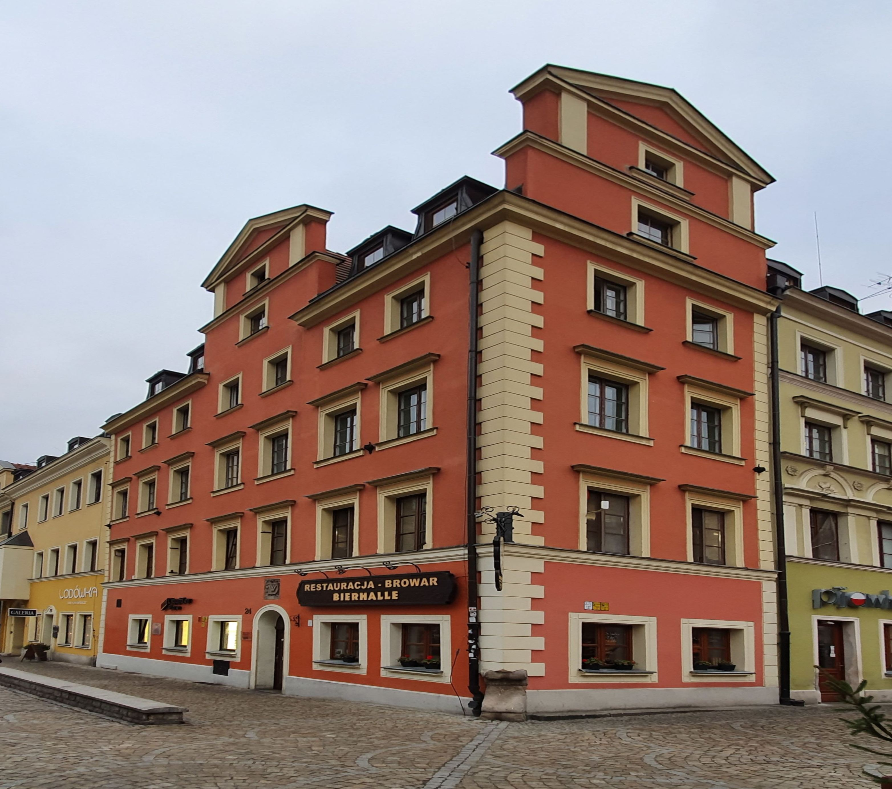 Kamienica Pod Zimnym Kamieniem we Wrocławiu, Rynek